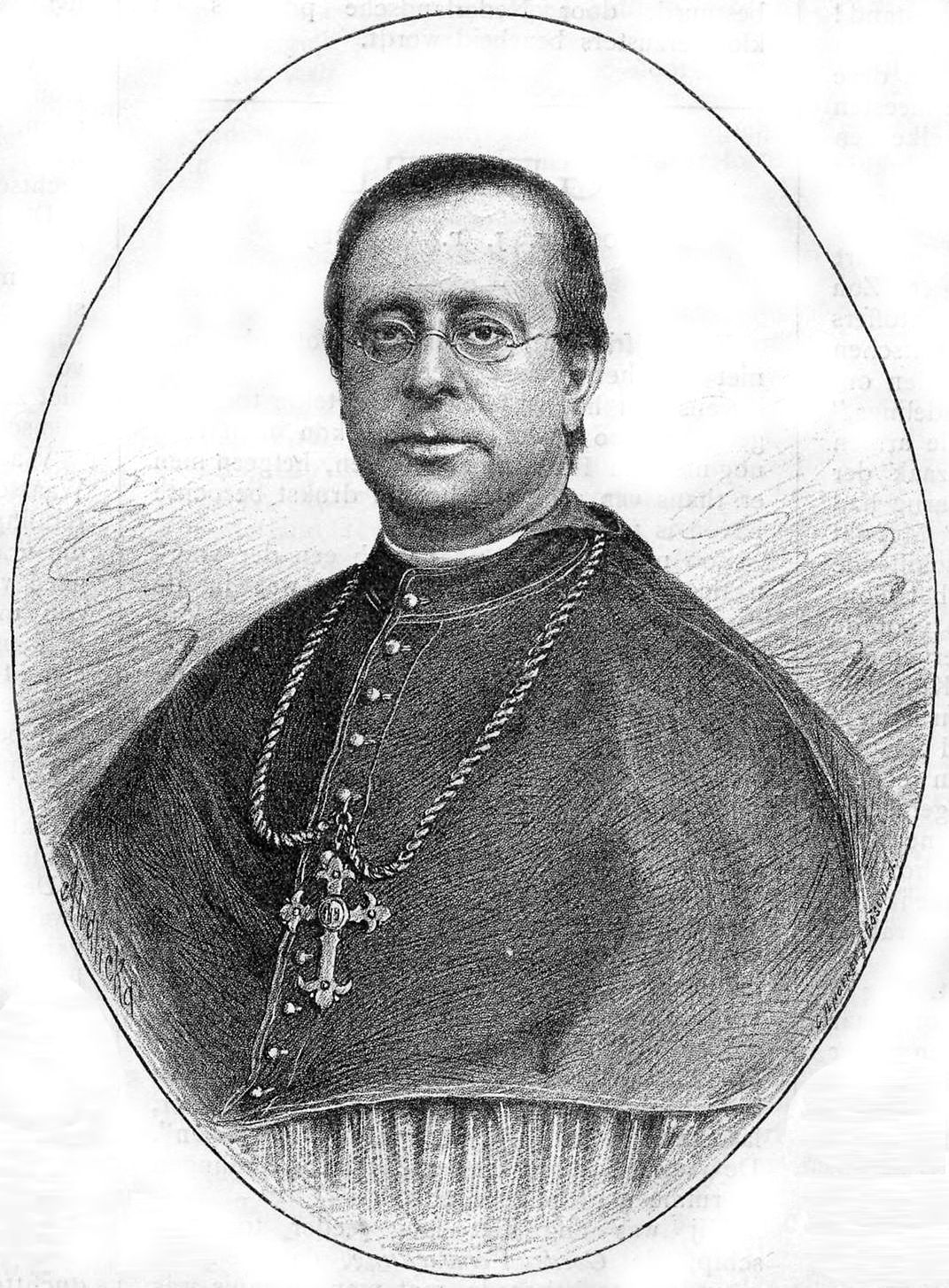 Mgr. Wilhelmus Antonius Ferdinandus Wulfingh (1839-1906), apostolisch vicaris van Suriname 1889 - 1906